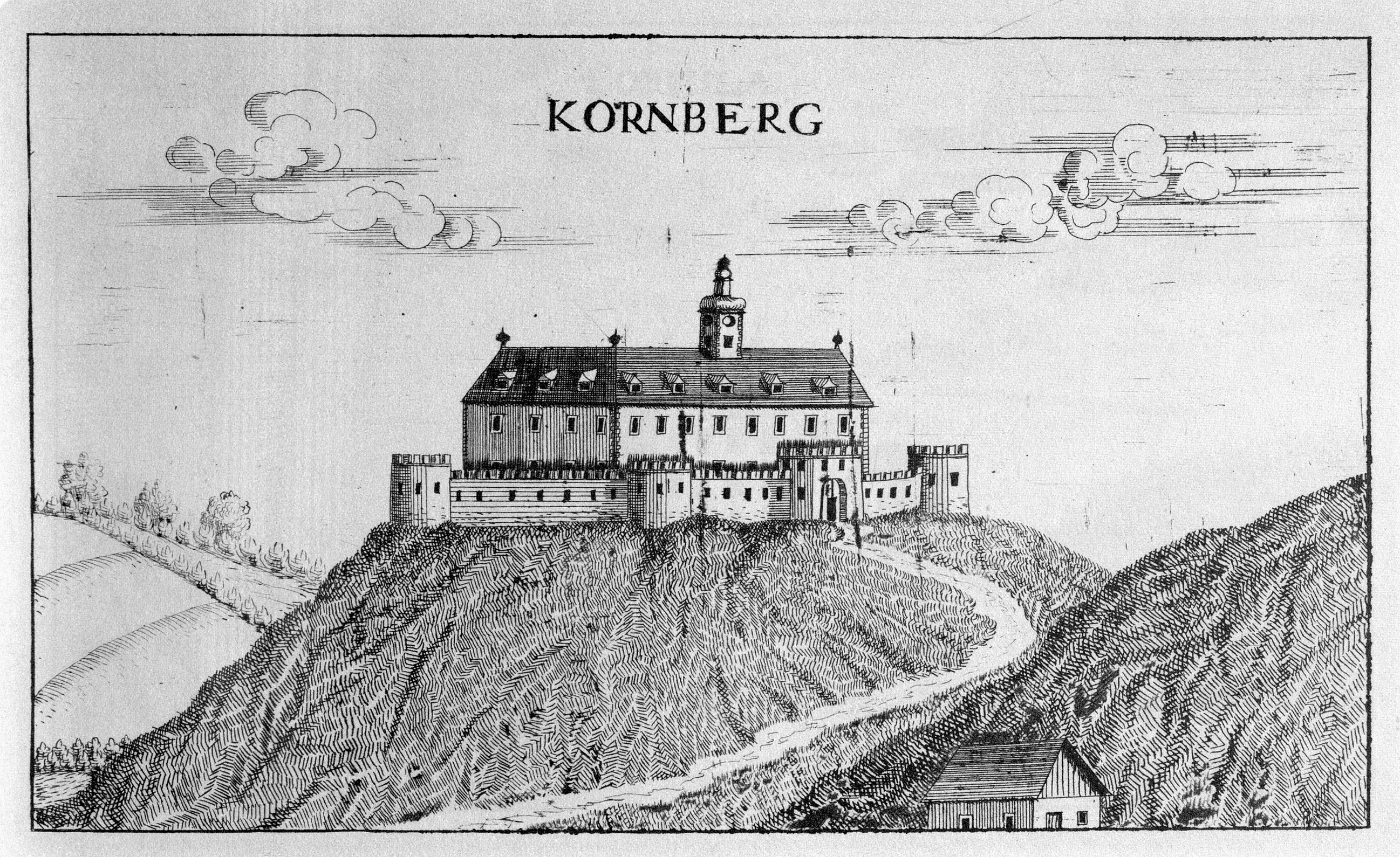 G. M. Vischers Käyserlichen Geographi, Topographia Ducatus Stiriae, Das ist: Eigentliche Delineation / und Abbildung aller Städte / Schlösser / Marcktfleck / Lustgärten / Probsteyen / Stiffter / Clöster und Kirchen / so es sich im Herzogthumb Steyrmarck befinden; Und anjetzo Umb einen billichen Preyß zu finden seynd Bey Johann Bitsch Universitäts Buchhandlern / Auff dem Juden=Platz bey der guldenen Saulen. Graz 1681 Die Nummerierung der Dateien folgt der alphabetischen Reihung der Ortsnamen